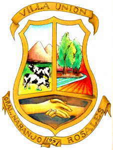 Escudo de armas del municipio de Villa Unión, Coahuila